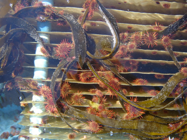 Erizos de mar (Loxechinus albus) juveniles